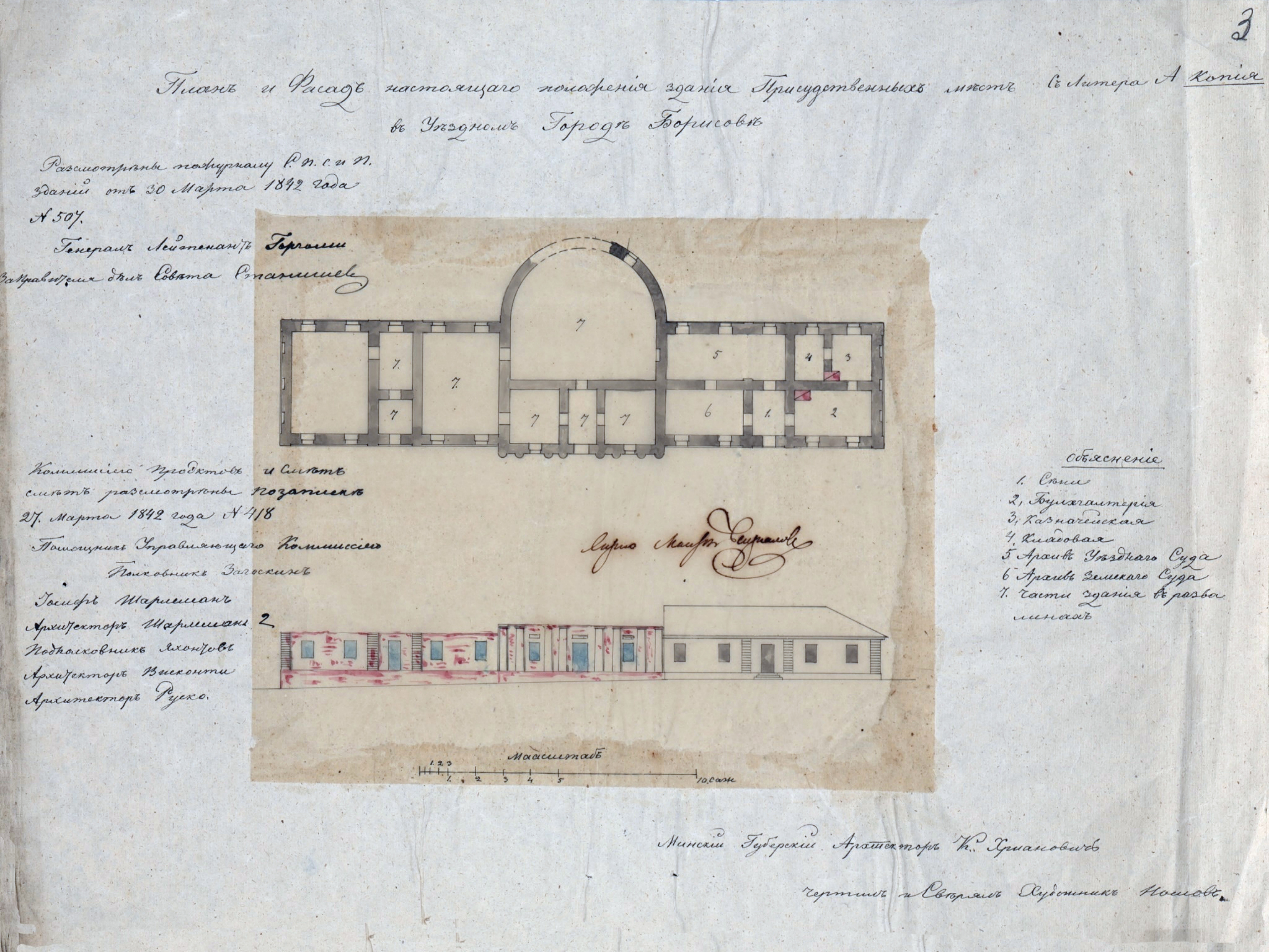 Беларуская (тарашкевіца): Барысаў (Barysaŭ), пляц Рынак (plac Rynak). Прысутныя месцы